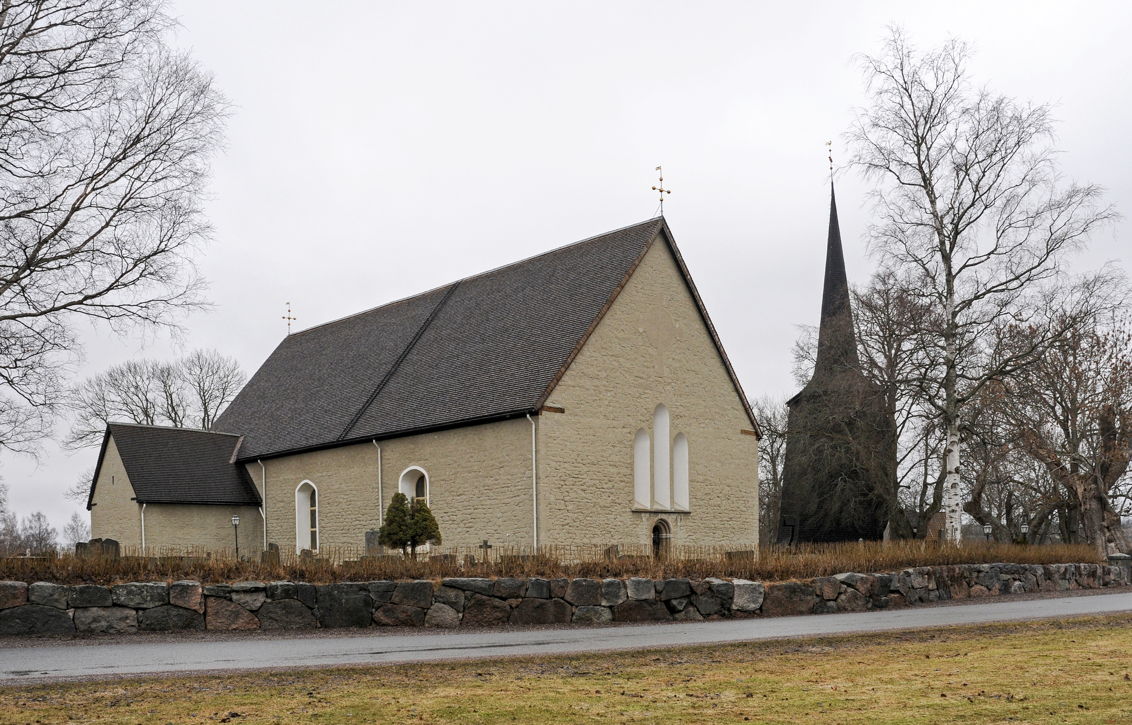 Sköllersta kyrka i Sköllersta församling